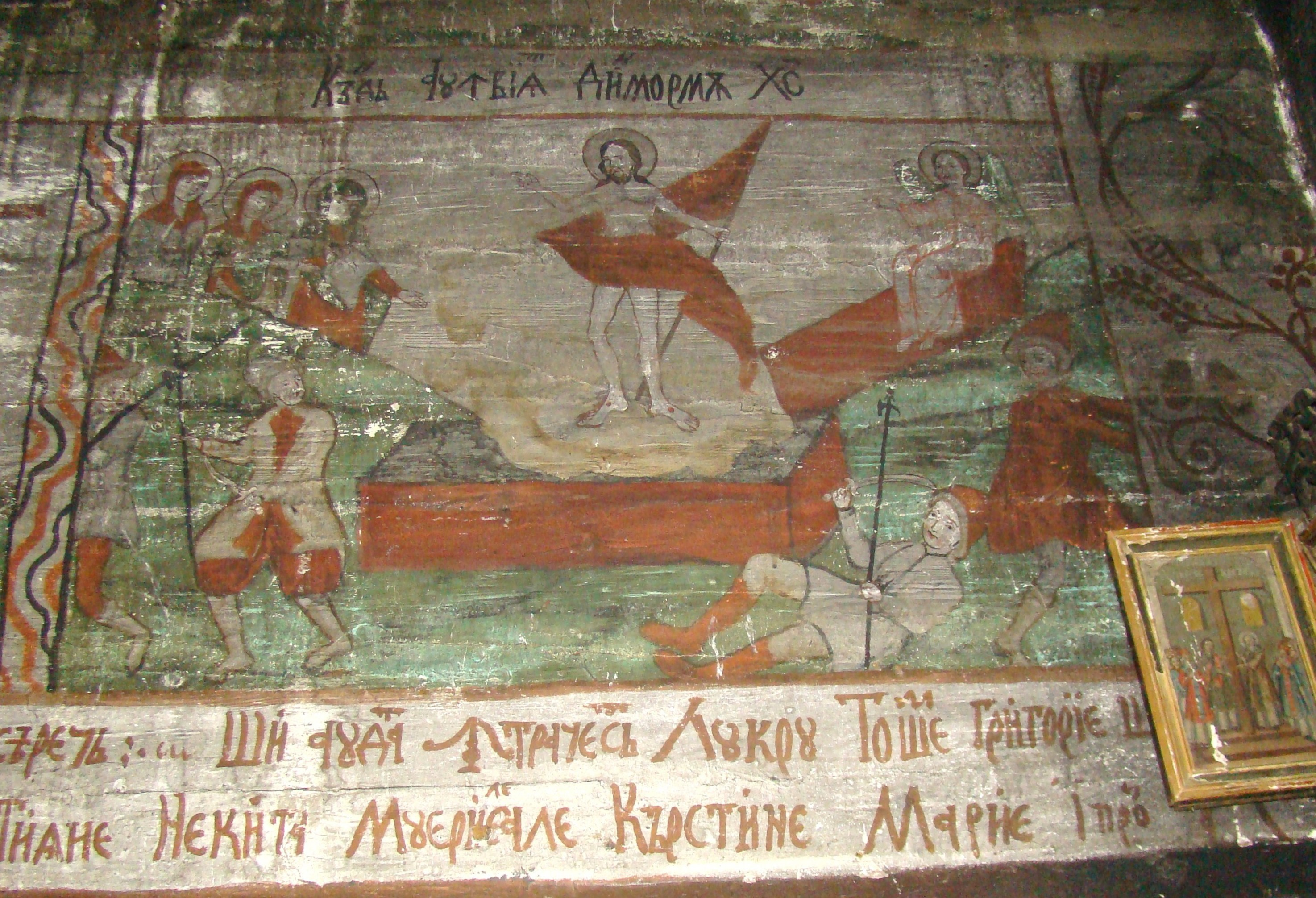 Biserica de lemn "Cuvioasa Paraschiva" , sat POIENILE IZEI